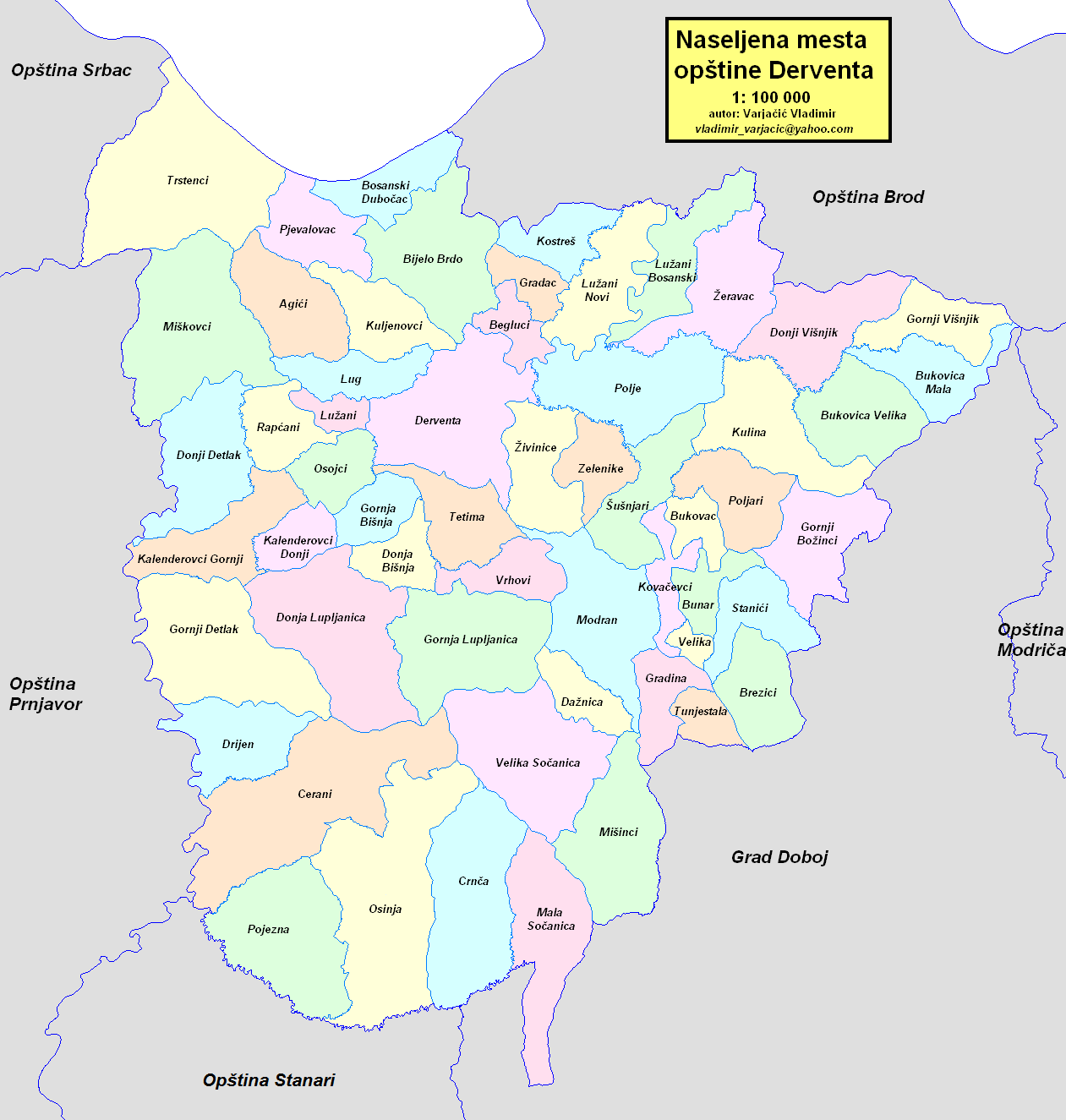 Opština Derventa